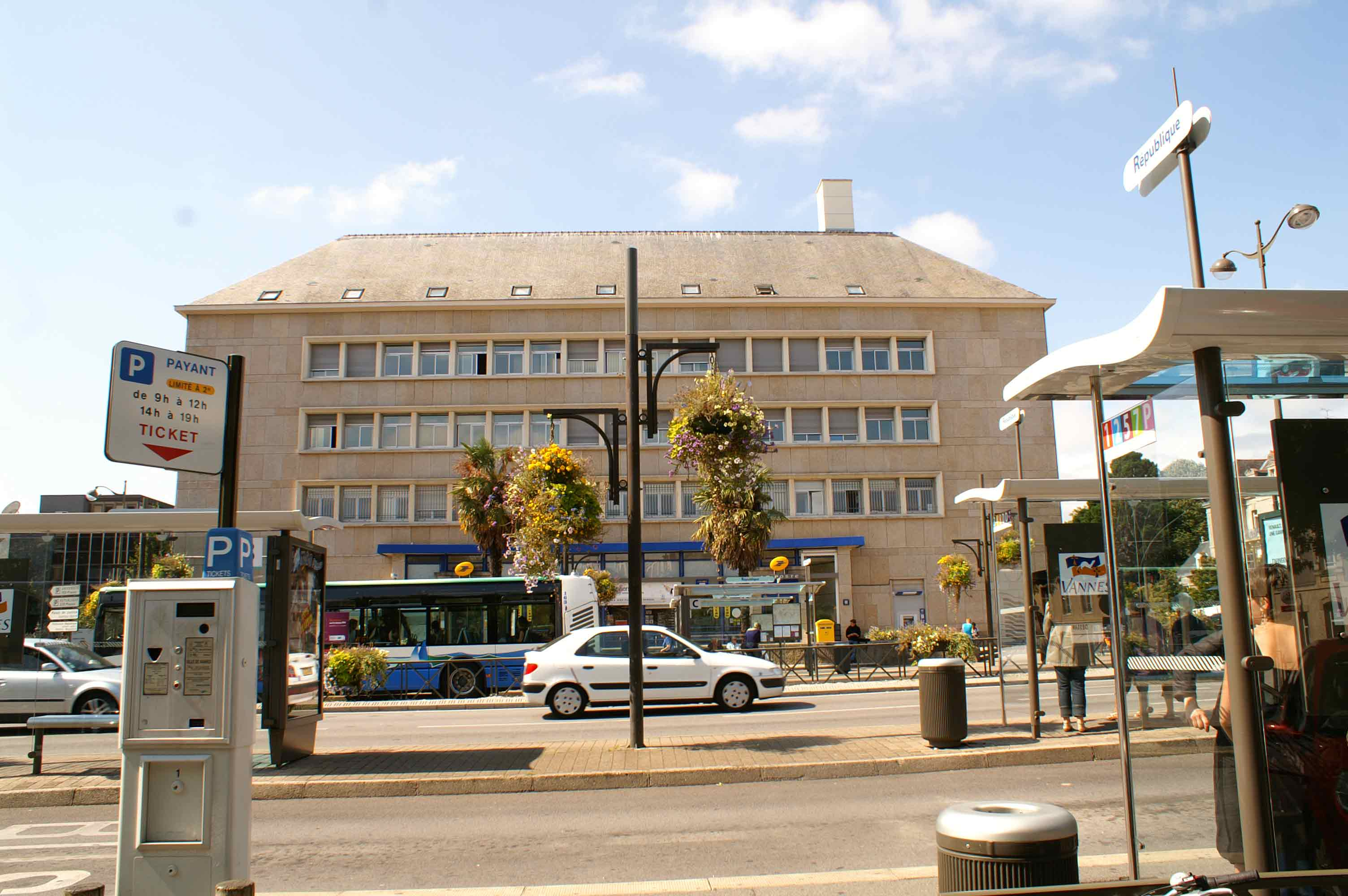 Vannes, station Republique, la Poste et mobilier urbain